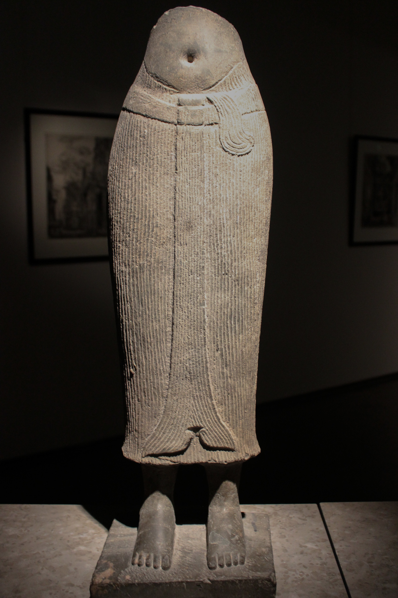 Musée Guimet. Arte de Camboya.